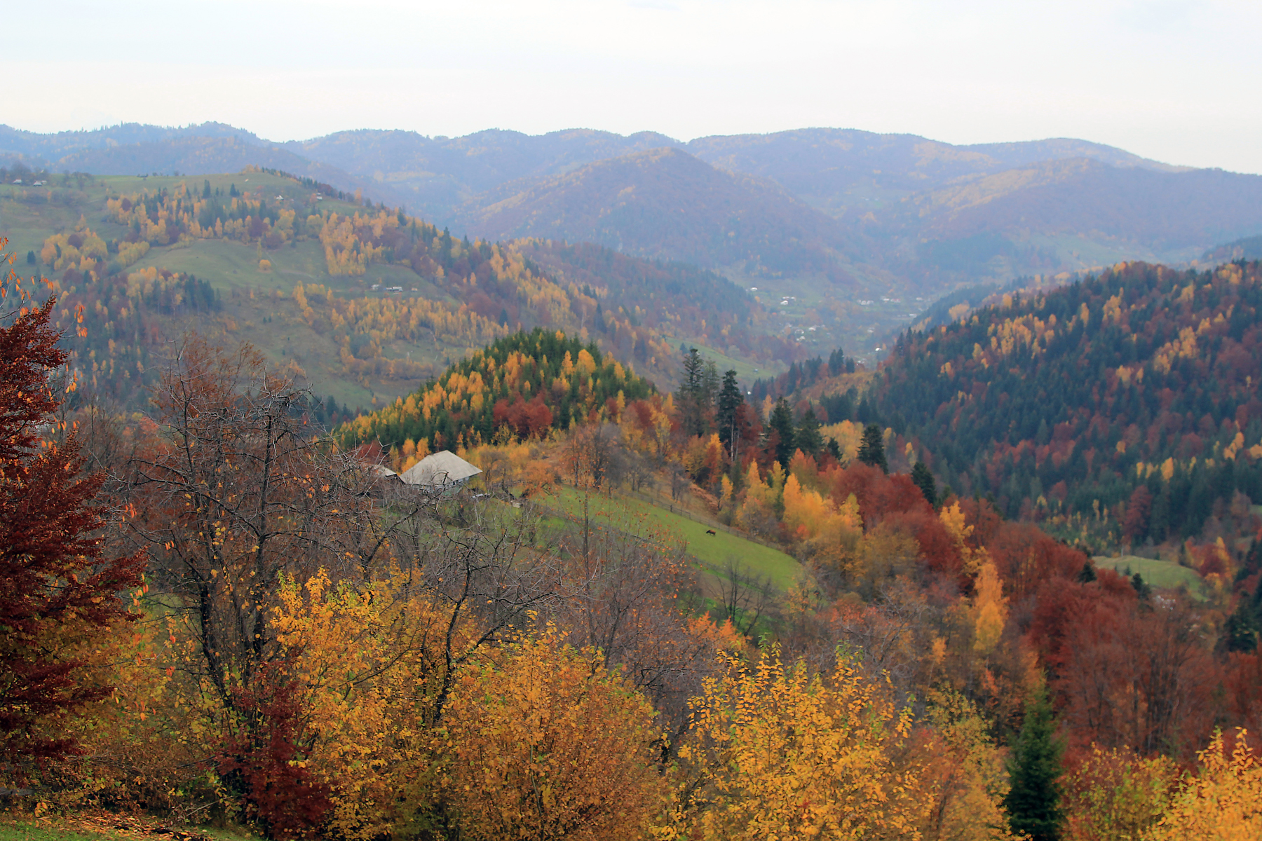 «Чивчино-Гринявський», Верховинський район, Чивчинське лісництво, кв. 11, 13-16, 24, 26-42 Буркутське лісництво, кв.14-19,23-25, 32-35 Паркалабське лісництво, кв.8,9,14,16-20 . Полонини: «алузька», «Прелуки», «Ретундул», «Лустун», «Мале Пір'є», «Попадя», «Гнітеса», «Чивчин», «Штевйора»